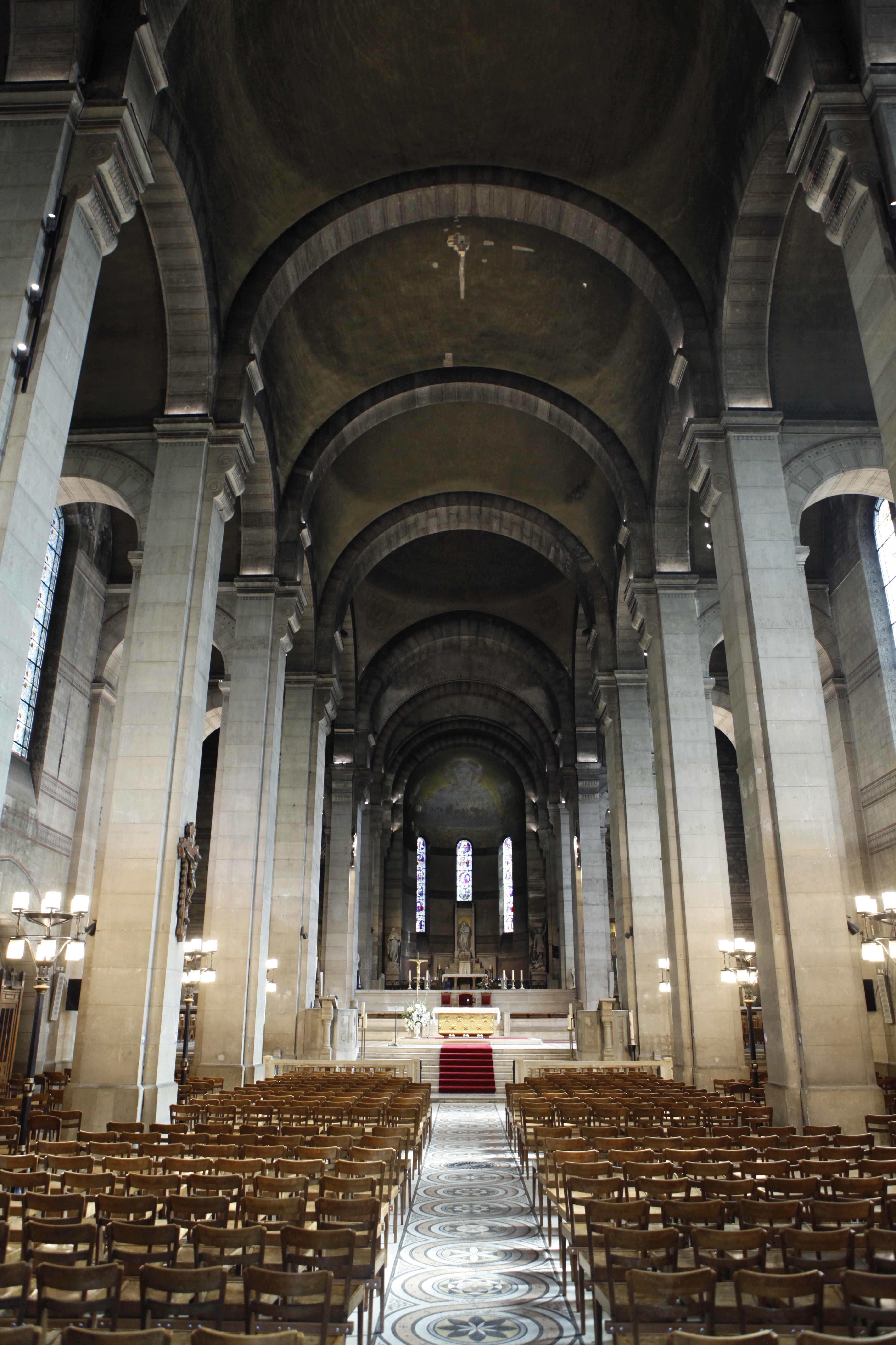 Eglise Notre Dame d'Auteuil